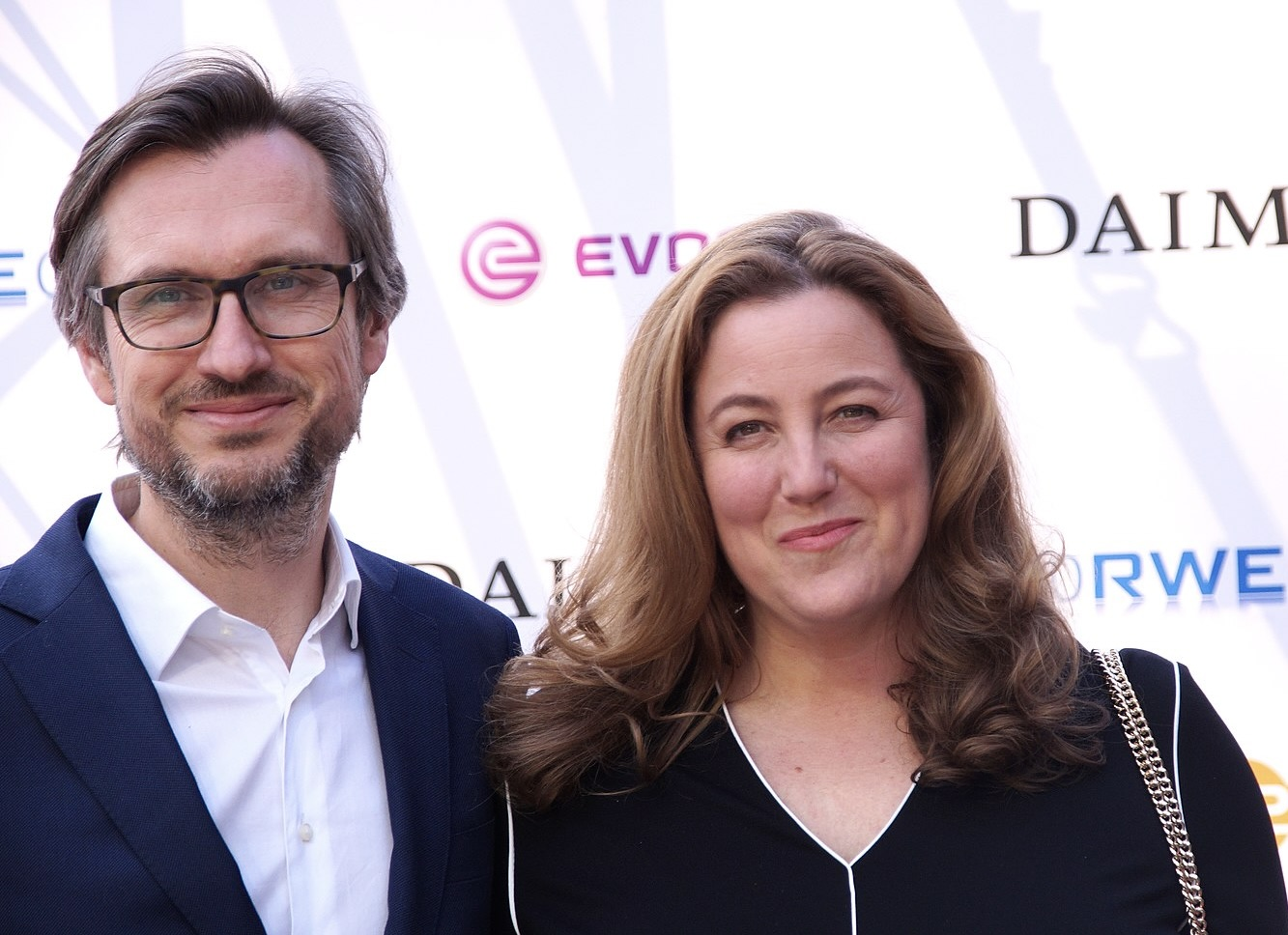 Jörg Winger und Anna Winger bei der Verleihung des 'Grimme Preis 2016' am 08.04.2016 in Marl.